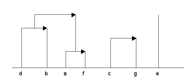 exemple de hiérarchie cohesitive en ASI